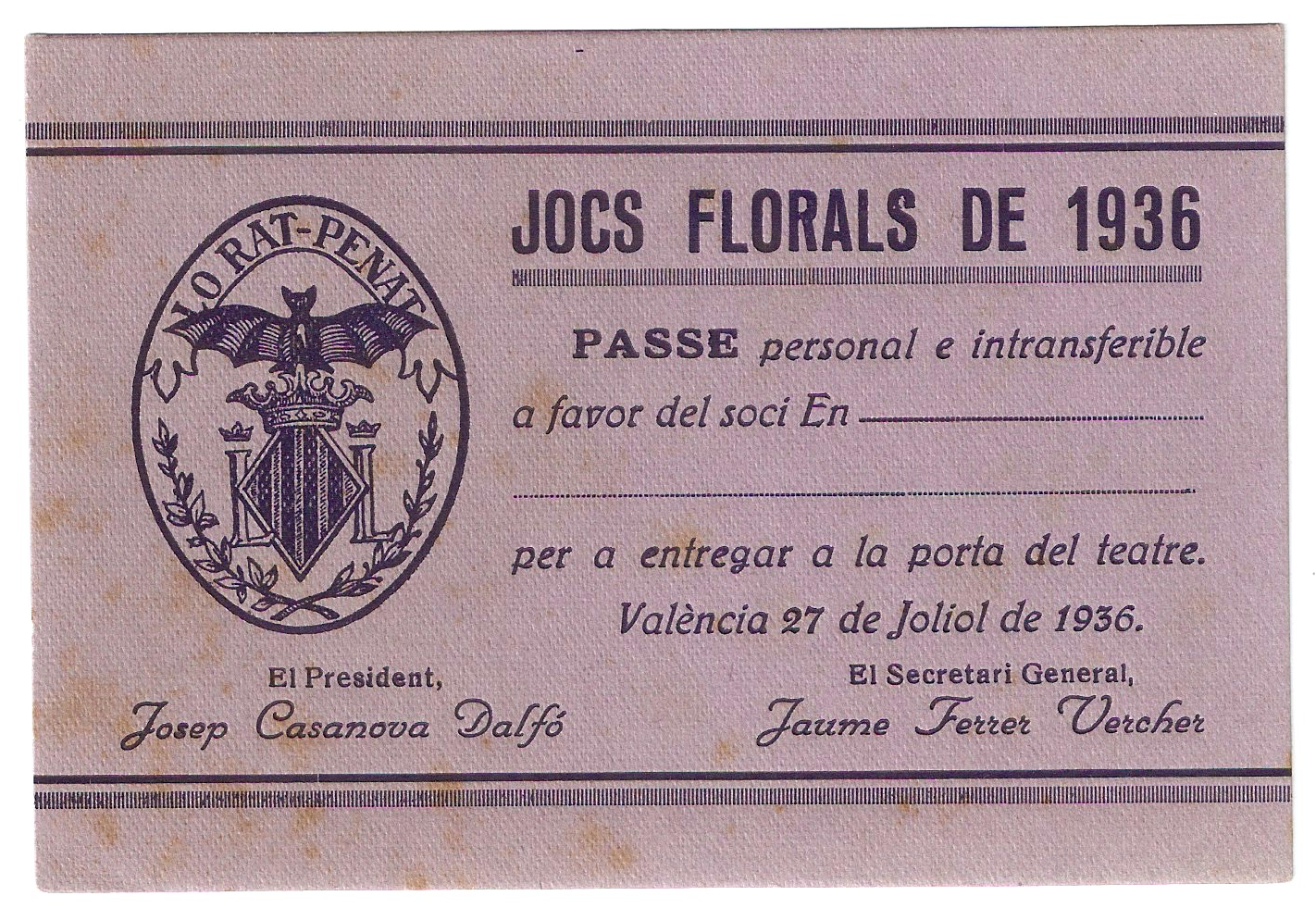 Pase para los Juegos Florales de 1936. Previstos para el 27 de julio, el estallido de la Guerra Civil impidió su realización.